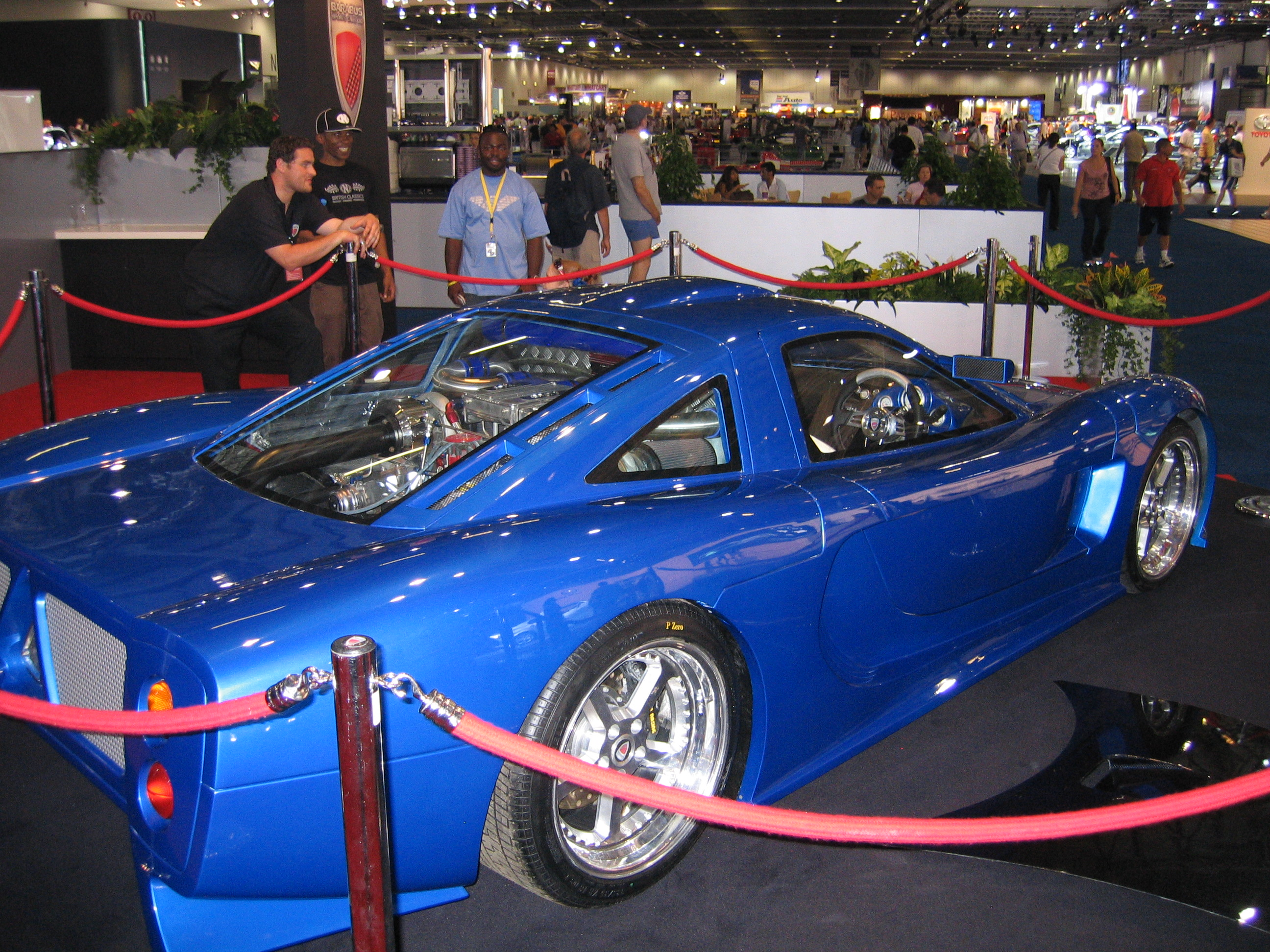 The Barabus TKRBarabus Supercar